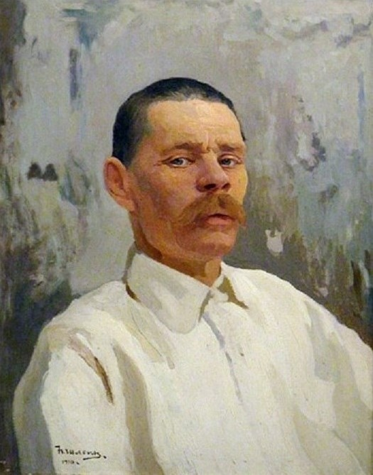 "Портрет Максима Горького", художник Н. П. Шлеин